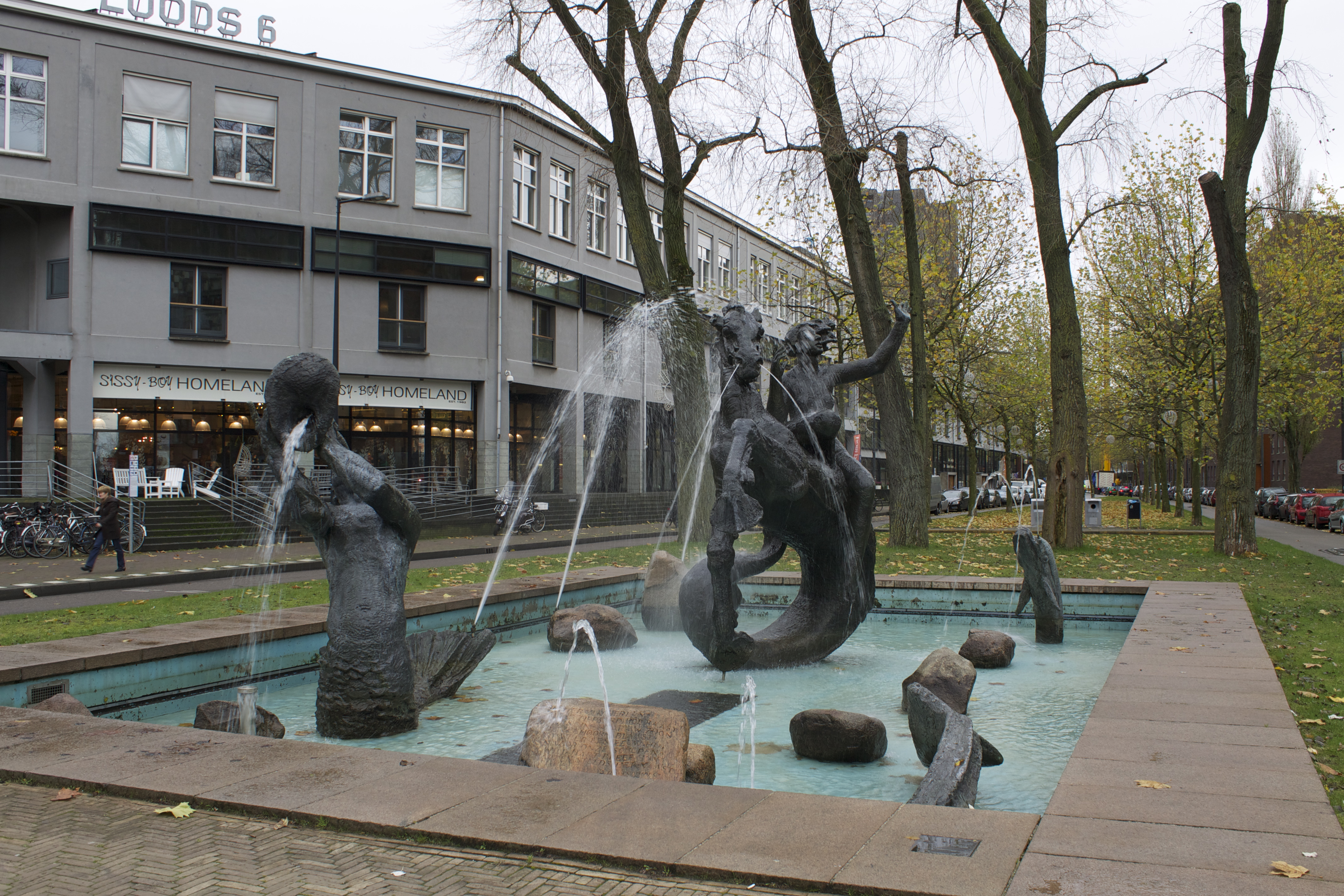 Sculpture "Amphitrite", at KNSM-laan, KNSM-eiland, Eastern Docklands, Amsterdam, Netherlands